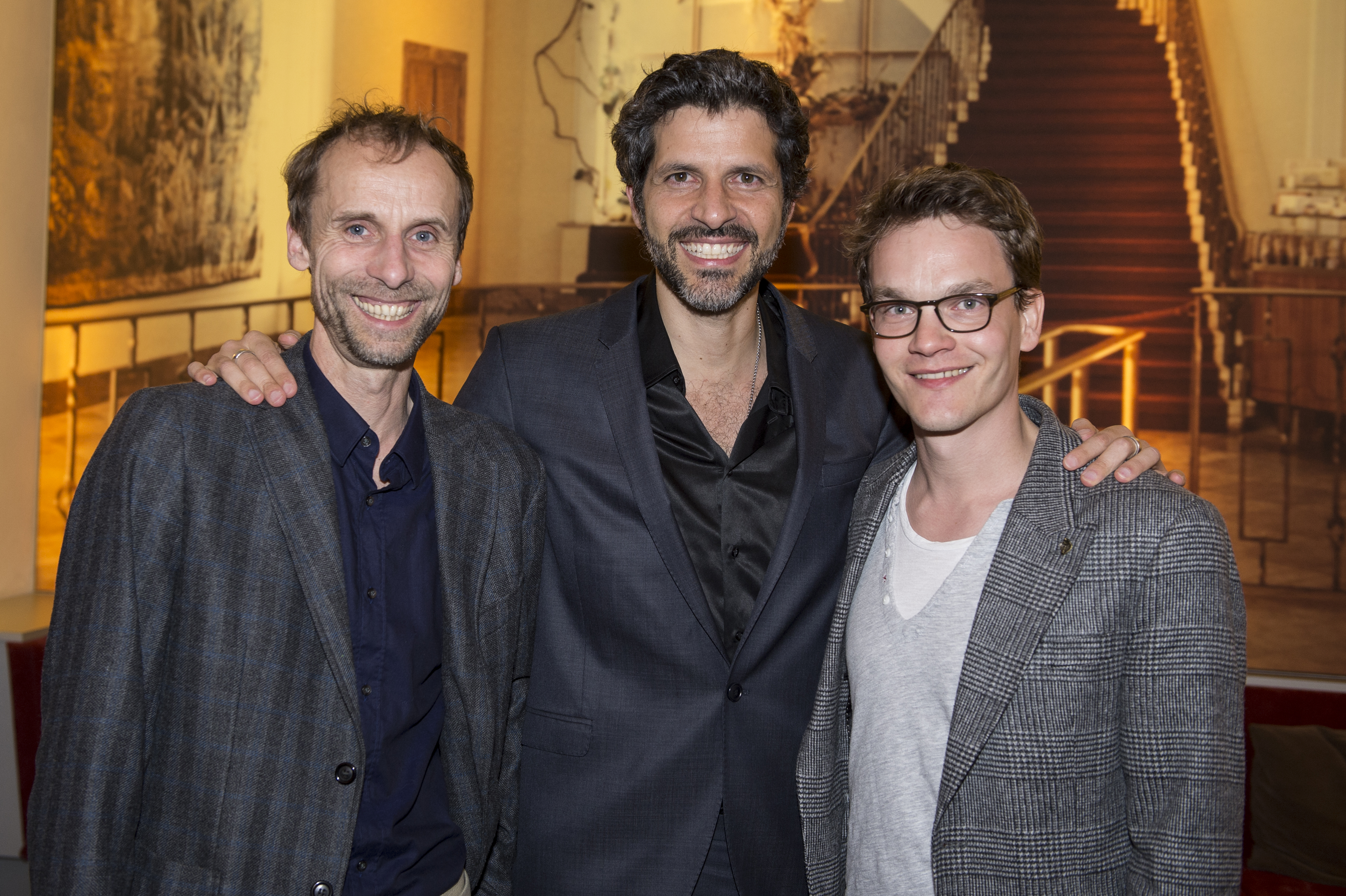 Bretonische Verhältnisse Premiere am 16.04.2014 in München Jan Georg Schütte, Pasquale Aleardi, Ludwig Blochberger